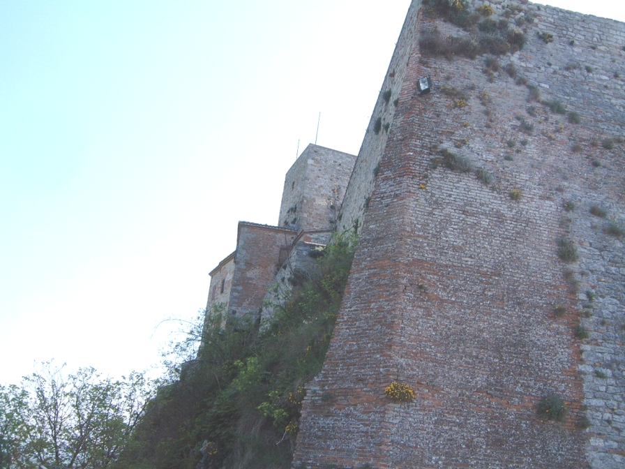 Mur de la forterresse de Verucchio (Rimini), Italie